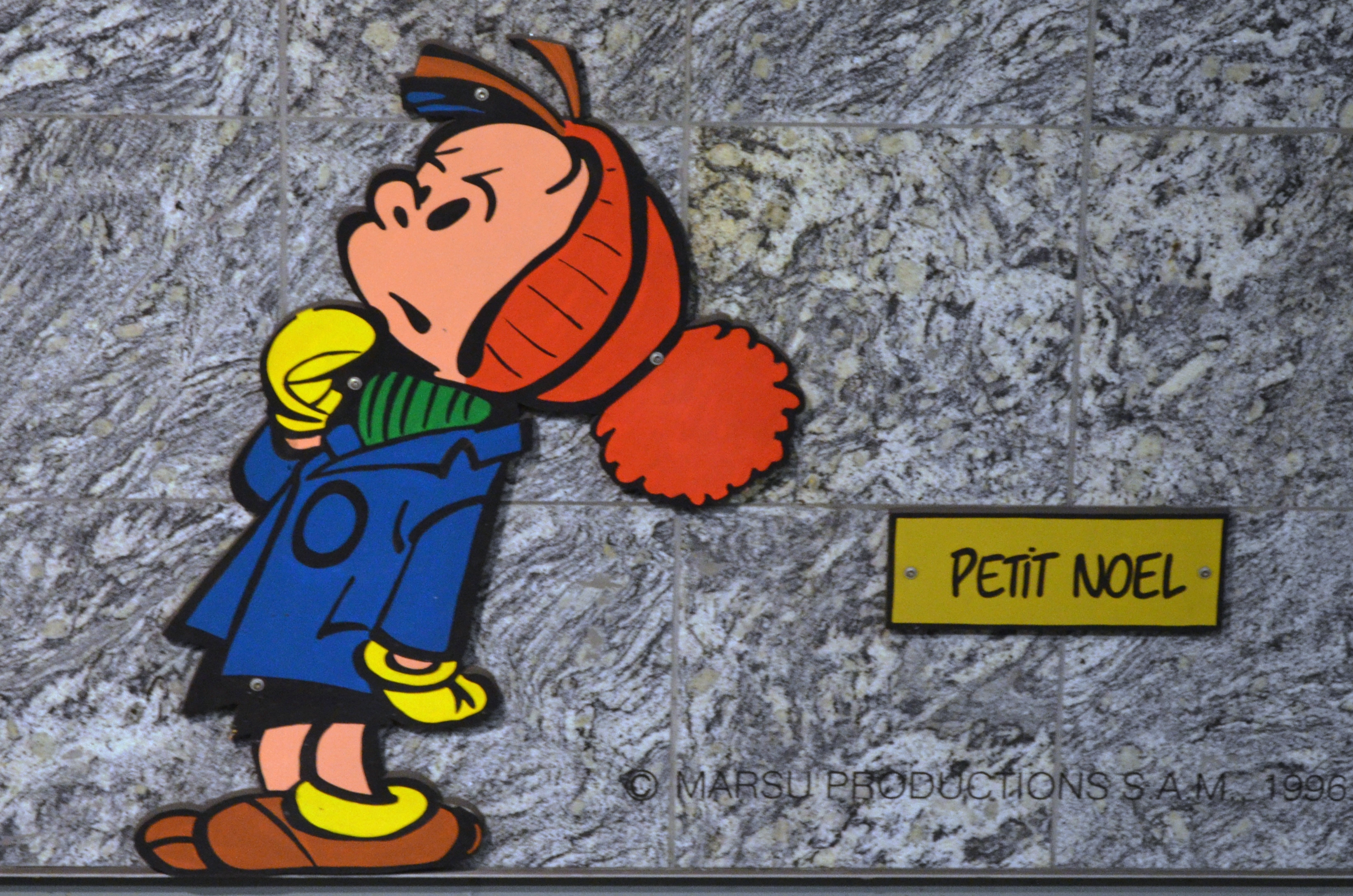 Charleroi (Belgique) - Station Janson du métro léger. Petit Noël.